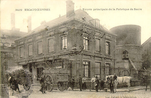 Carte postale ancienne représentant la sucrerie d'escaudoeuvres